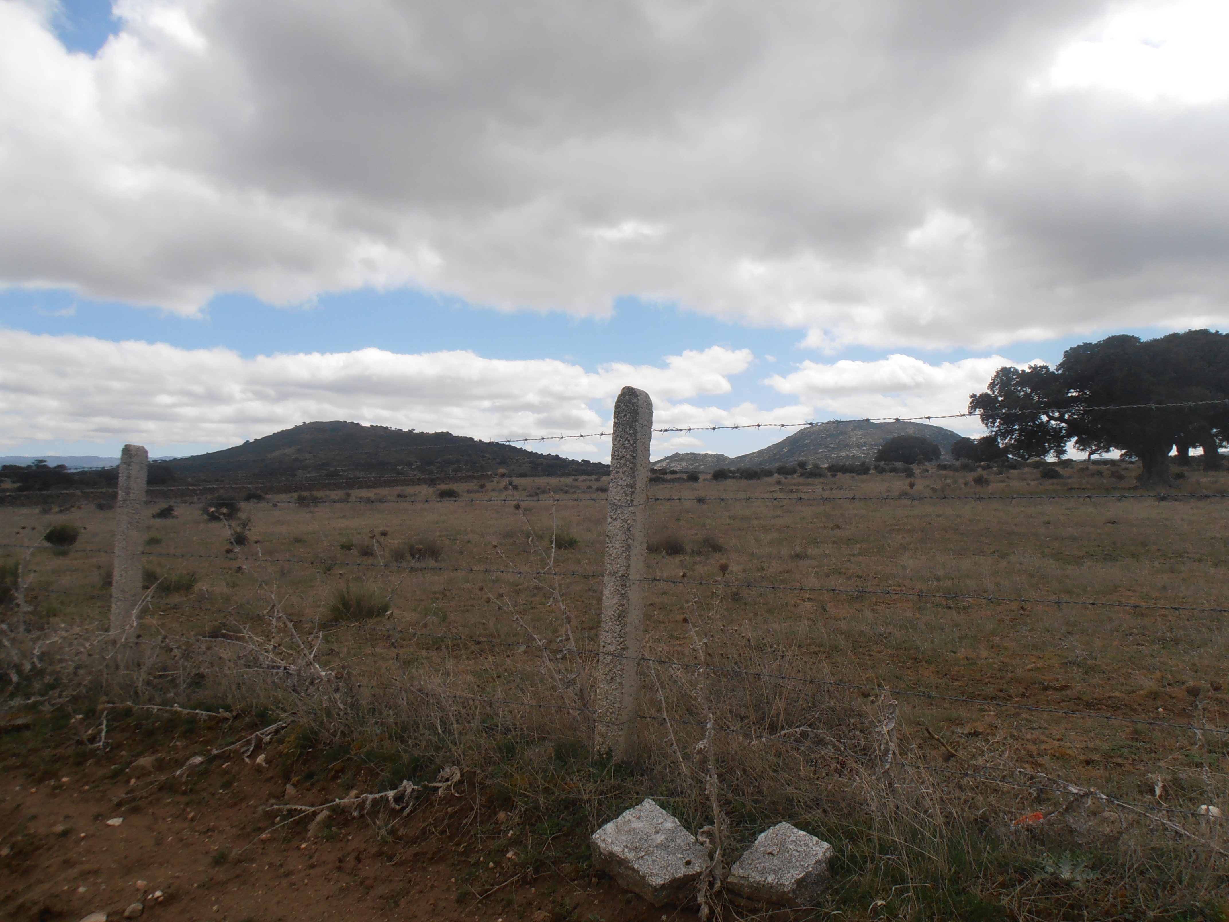 cabeza buha y el berrueco